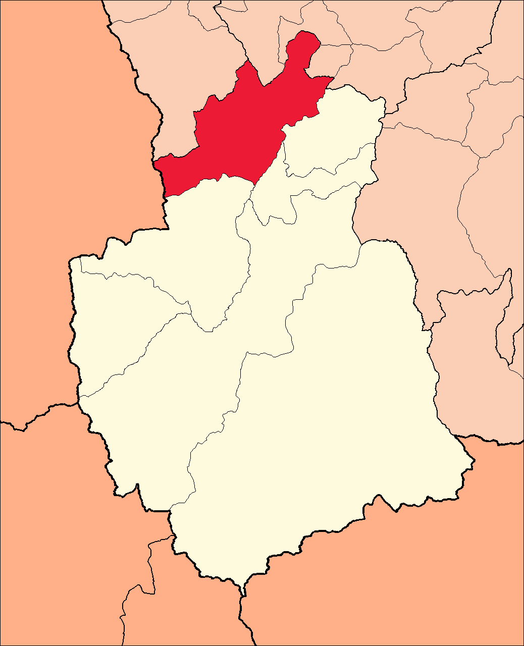 Área del distrito de Rondos dentro de la provincia de Lauricocha.